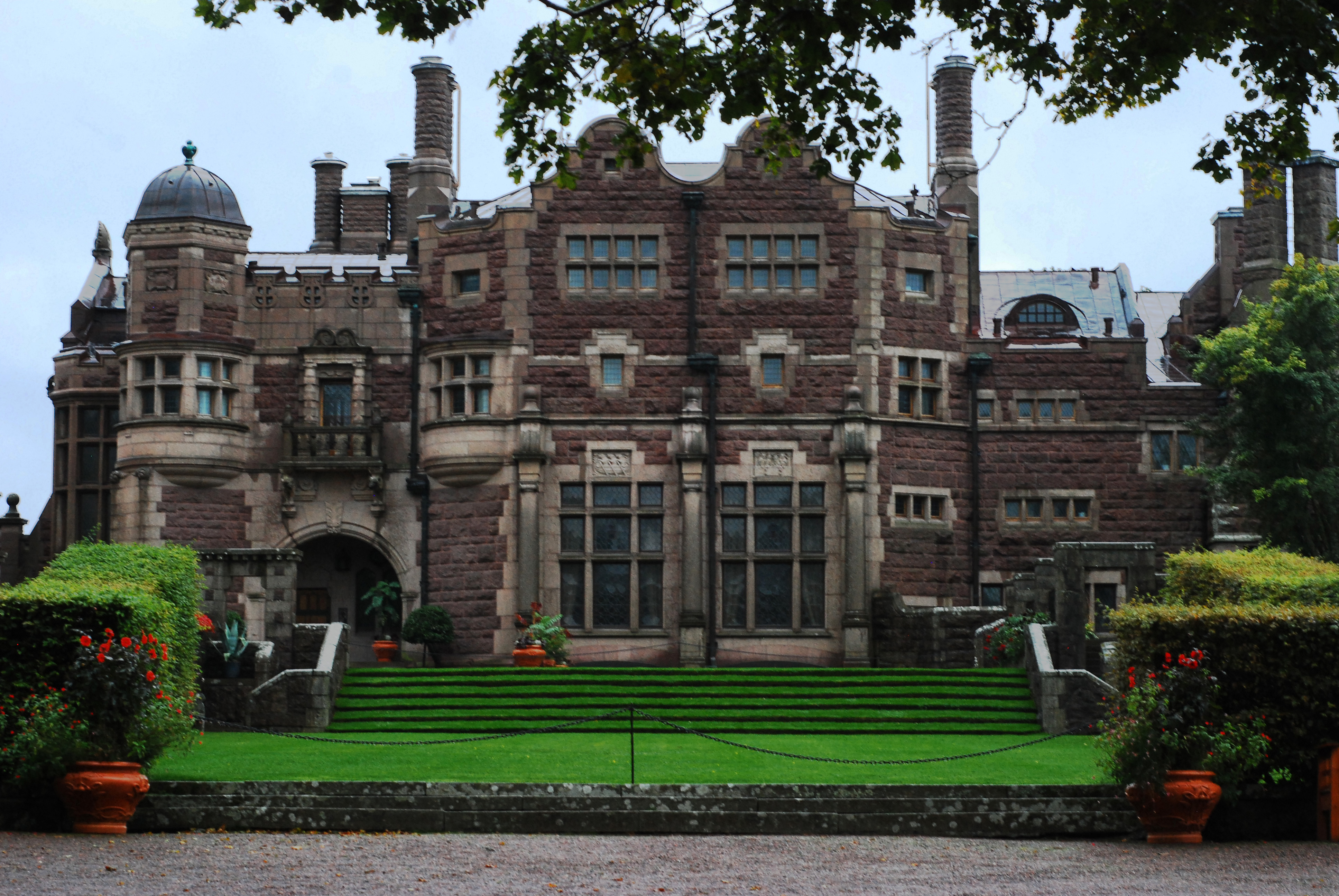 Tjolöholms slott under regnrusk